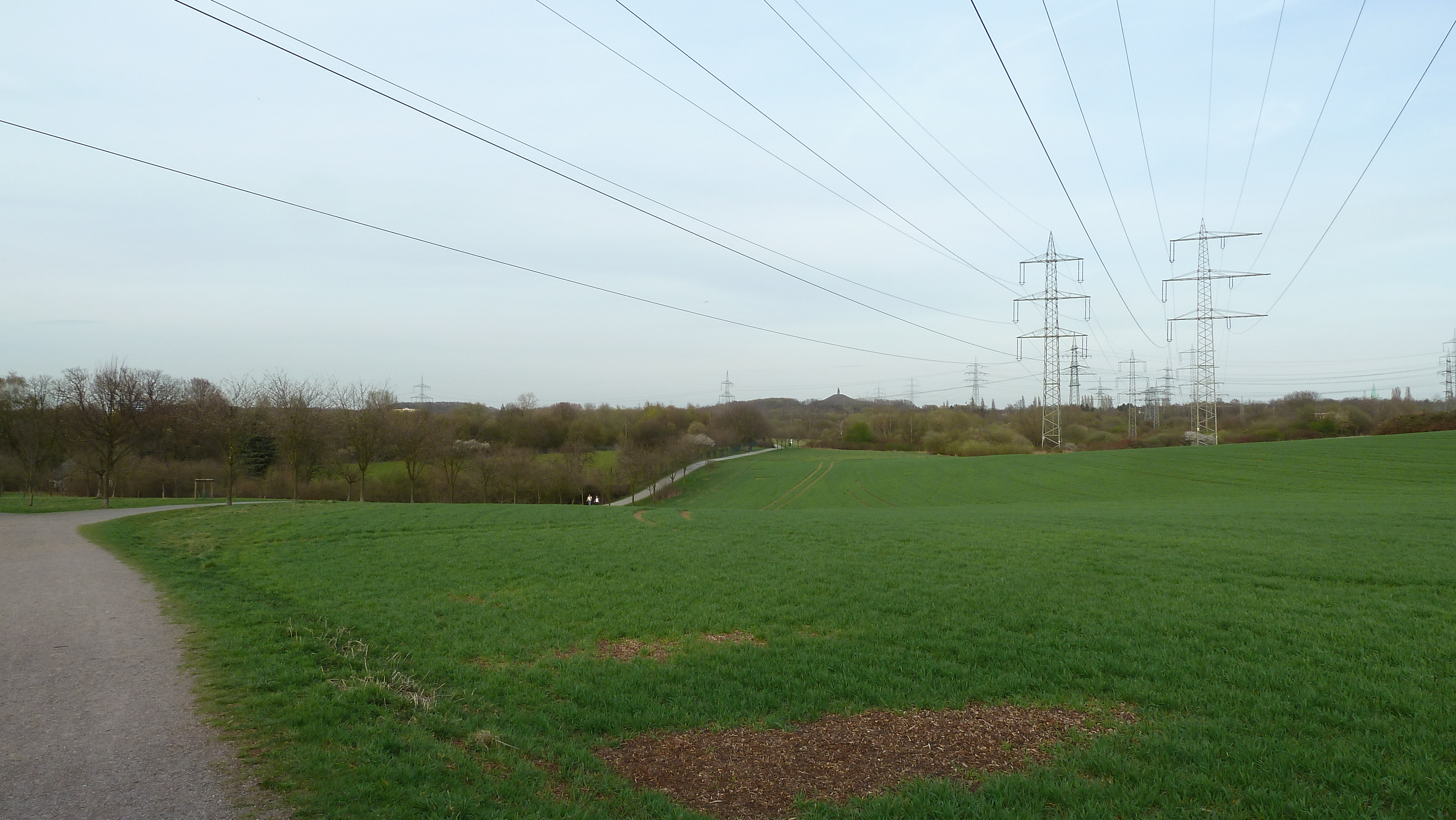 Landschaftspark Mechtenberg, Essen